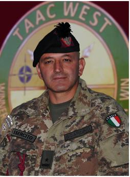 Il generale Maurizio Angelo Scardino